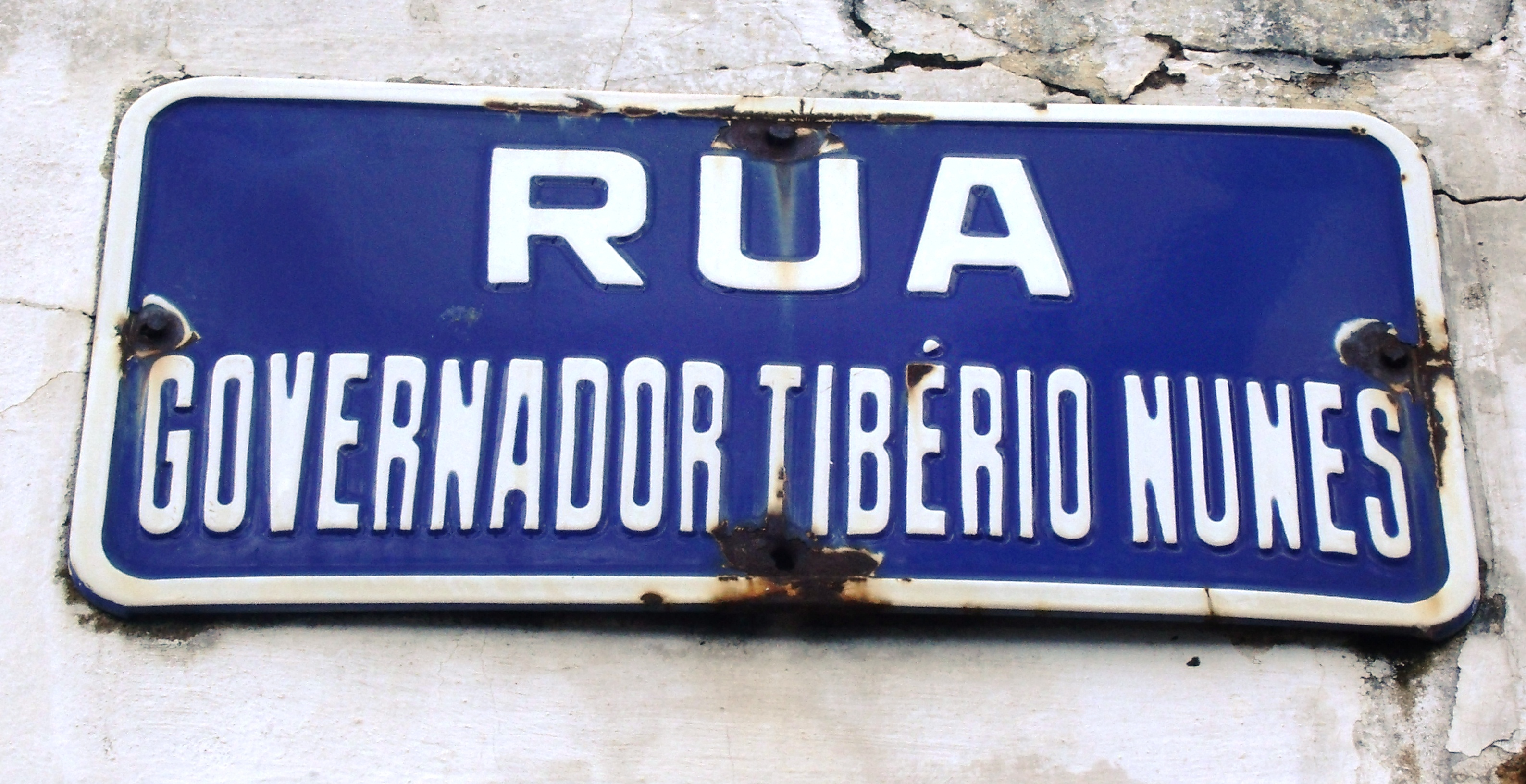 Placa clássica de rua, no caso, da Rua Governador Tibério Nunes, em Teresina-PI.